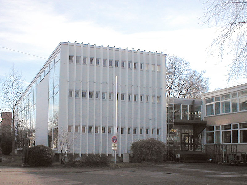 Theodor-Heuss-Gymnasium in der Karlstraße in Heilbronn.